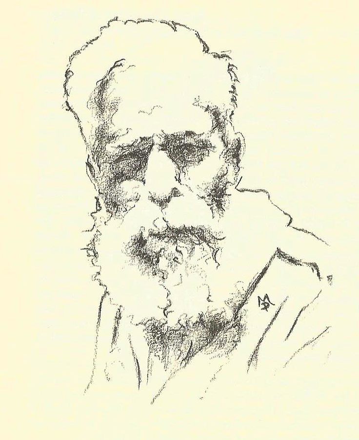 Miguel Pérez Reviriego. Retrato de Aurelio Cabrera Gallardo, 1995. Lápiz sobre papel. Publicado en Pérez Reviriego, Miguel (1996). Cien artistas de Extremadura. Badajoz: Carisma Libros. p. 94. ISBN 8488964110.